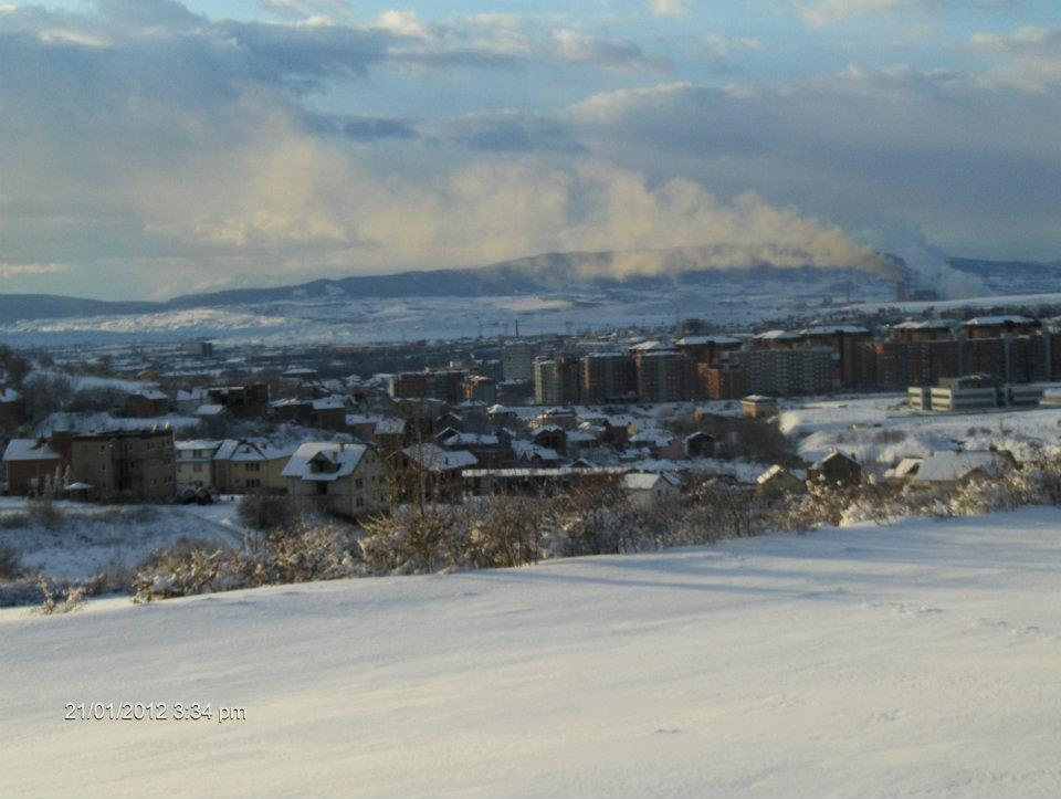 kosovo